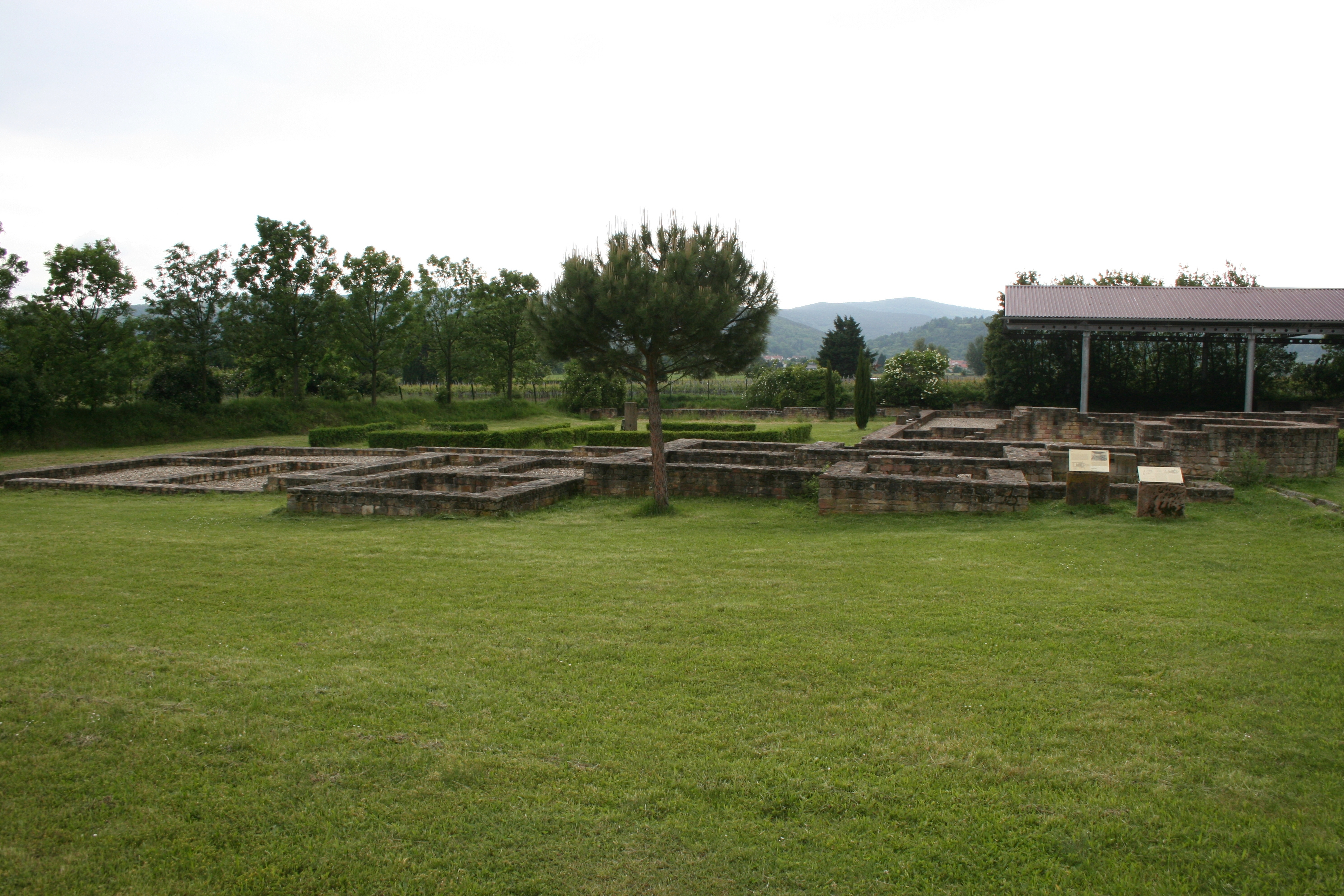 Römische Villa Wachenheim, Ansicht der rekonstruierten Grundmauern des Hauptgebäudes von Osten.